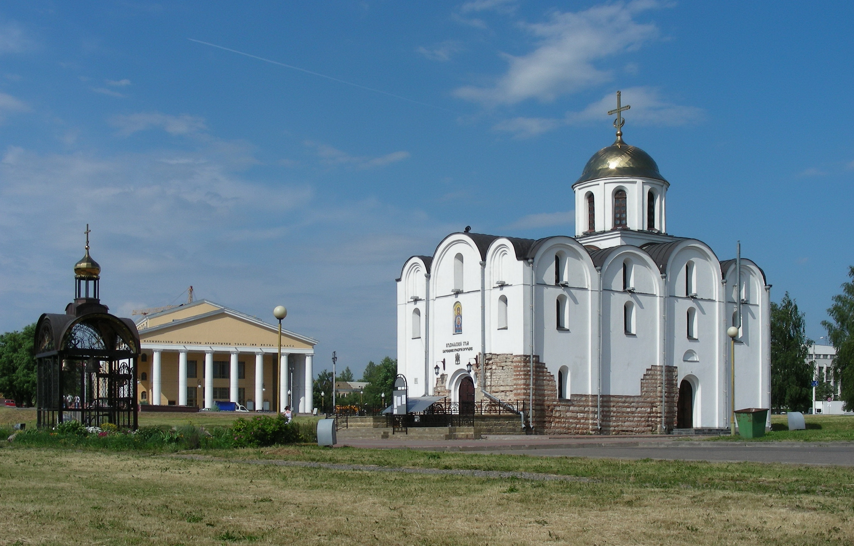 VITEBSK. Annunciation (Дабравешчанская) church (XII century).